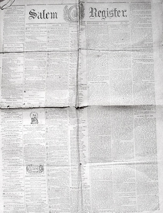 Newspaper, Salem, Massachusetts, USA